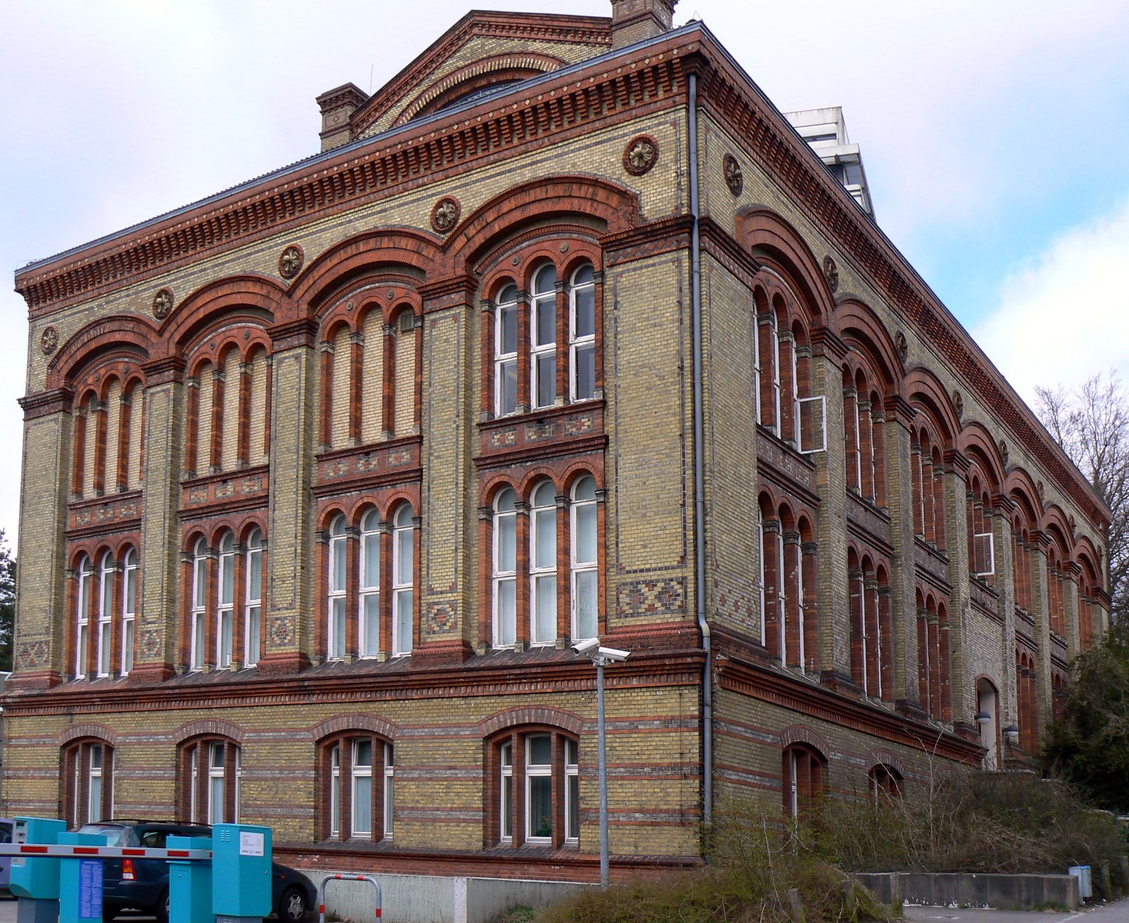 Zoologisches Museum und Völkerkundliches Museum der Universität Kiel (Seitenansicht). Das Gebäude wurde vom Berliner Architekten Martin Gropius und Prof. Karl August Möbius als Zoologisches Institut und Museum entworfen.